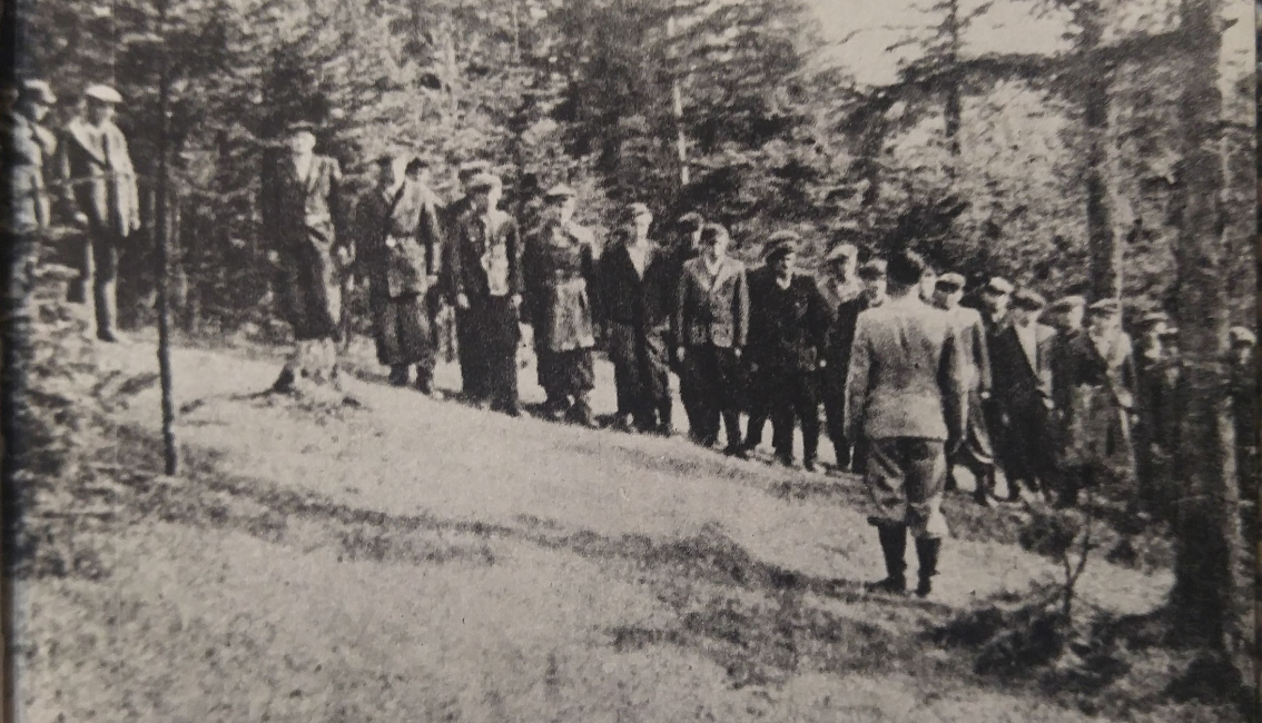 OP-11 Apel z okazji 3 maja 1944 na Myszkowskiem, autor nieznany, opublikowane na terenie Polski przed 1994 rokiem ("Z walk na Podkarpaciu" PAX 1971).